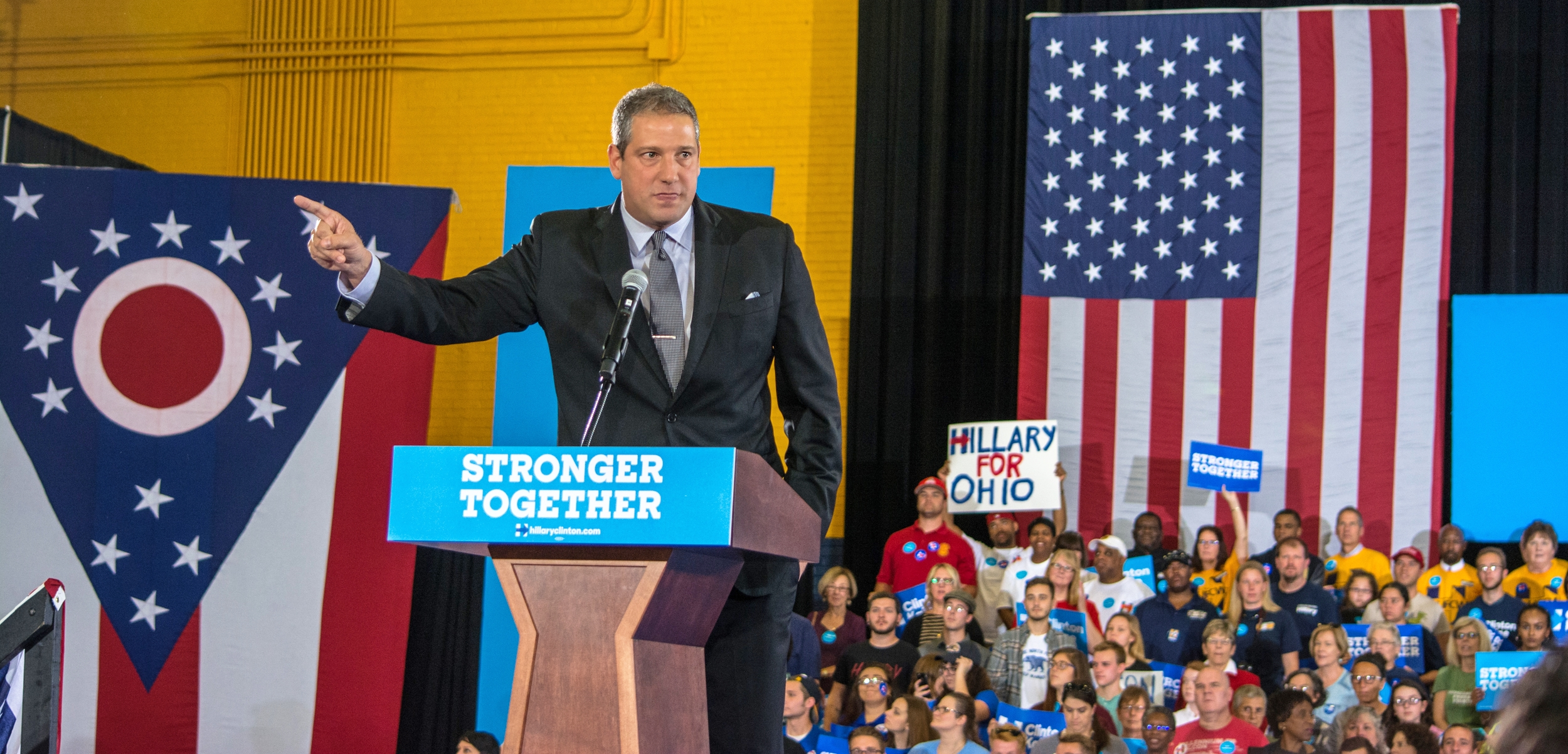 Rep Tim Ryan 03 - Akron Ohio - 2016-10-03